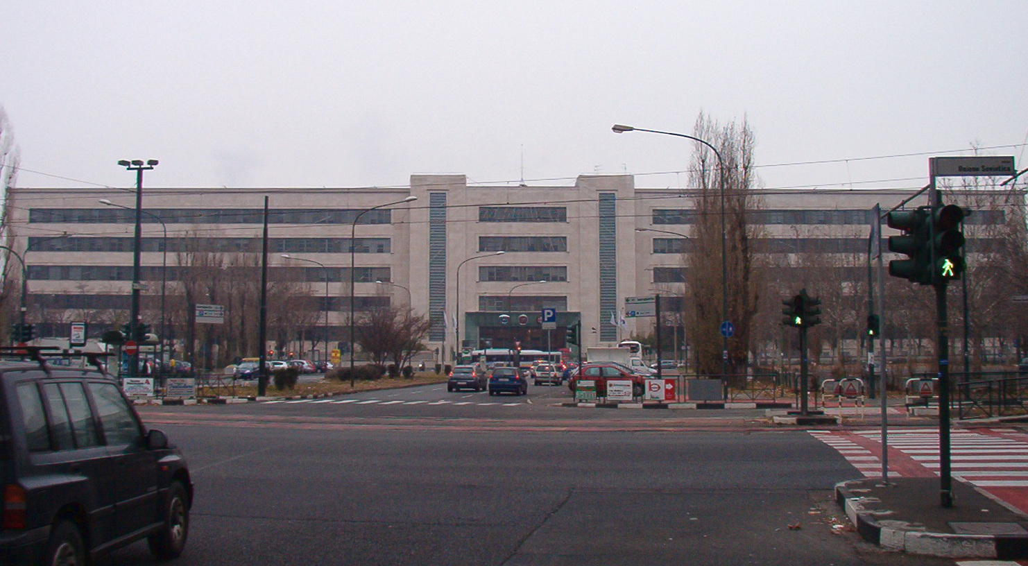 Stabilimento Fiat Mirafiori - Torino - Italy.